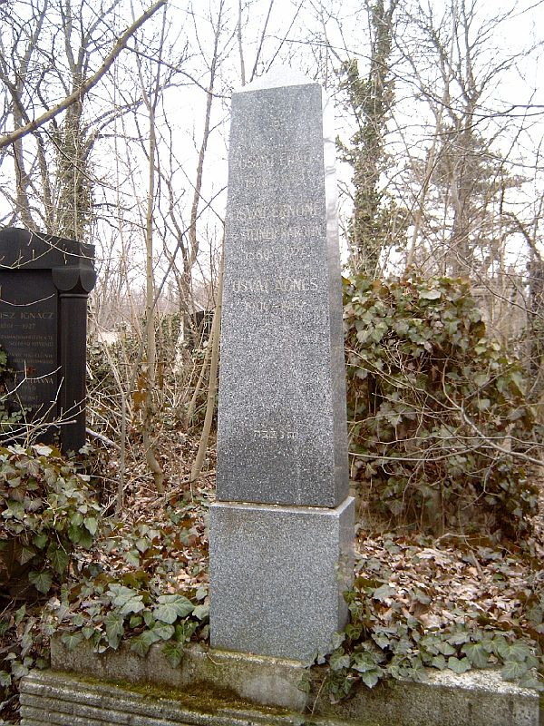 Osvát Ernő (Nagyvárad, 1877. ápr. 7. – Bp., 1929. okt. 28.) szerkesztő, író sírja Budapesten. Kozma utcai izraelita temető: 15-35-3.